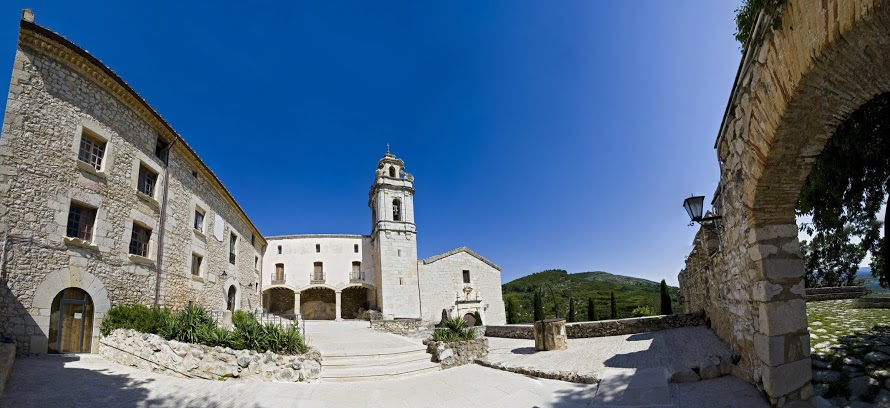 Ermita Virgen de los Angeles